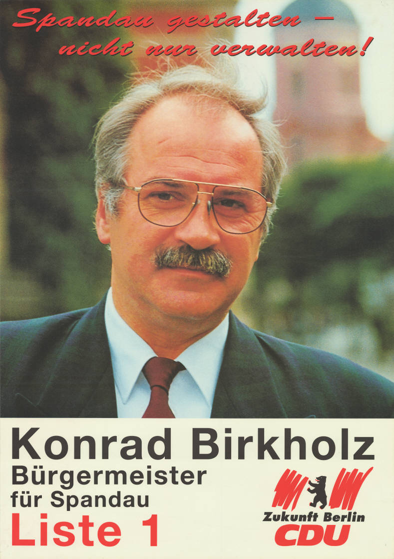 Spandau gestalten - nicht nur verwalten! Konrad Birkholz Bürgermeister für Spandau Liste 1 Zukunft Berlin CDU Abbildung: Porträtfoto - Berliner Bär Plakatart: Kandidaten/Personenplakat mit Objekt-Signatur: 10-004 : 1017 Bestand: Plakate zu Abgeordnetenhauswahlen Berlin (10-004) GliederungBestand10-18: Plakate zu Abgeordnetenhauswahlen Berlin (10-004) » CDU Lizenz: KAS/ACDP 10-004 : 1017 CC-BY-SA 3.0 DE